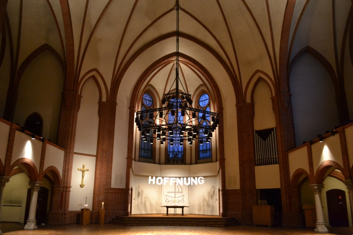 Blick in den Altarraum der Reformationskirche in Berlin-Moabit.